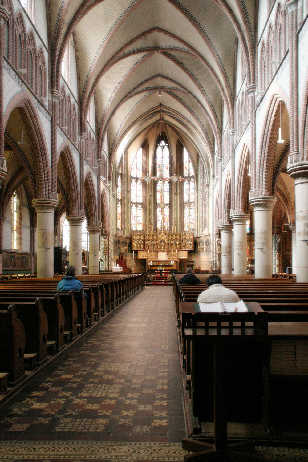 Interieur van de St. Jozefkathedraal te Groningen